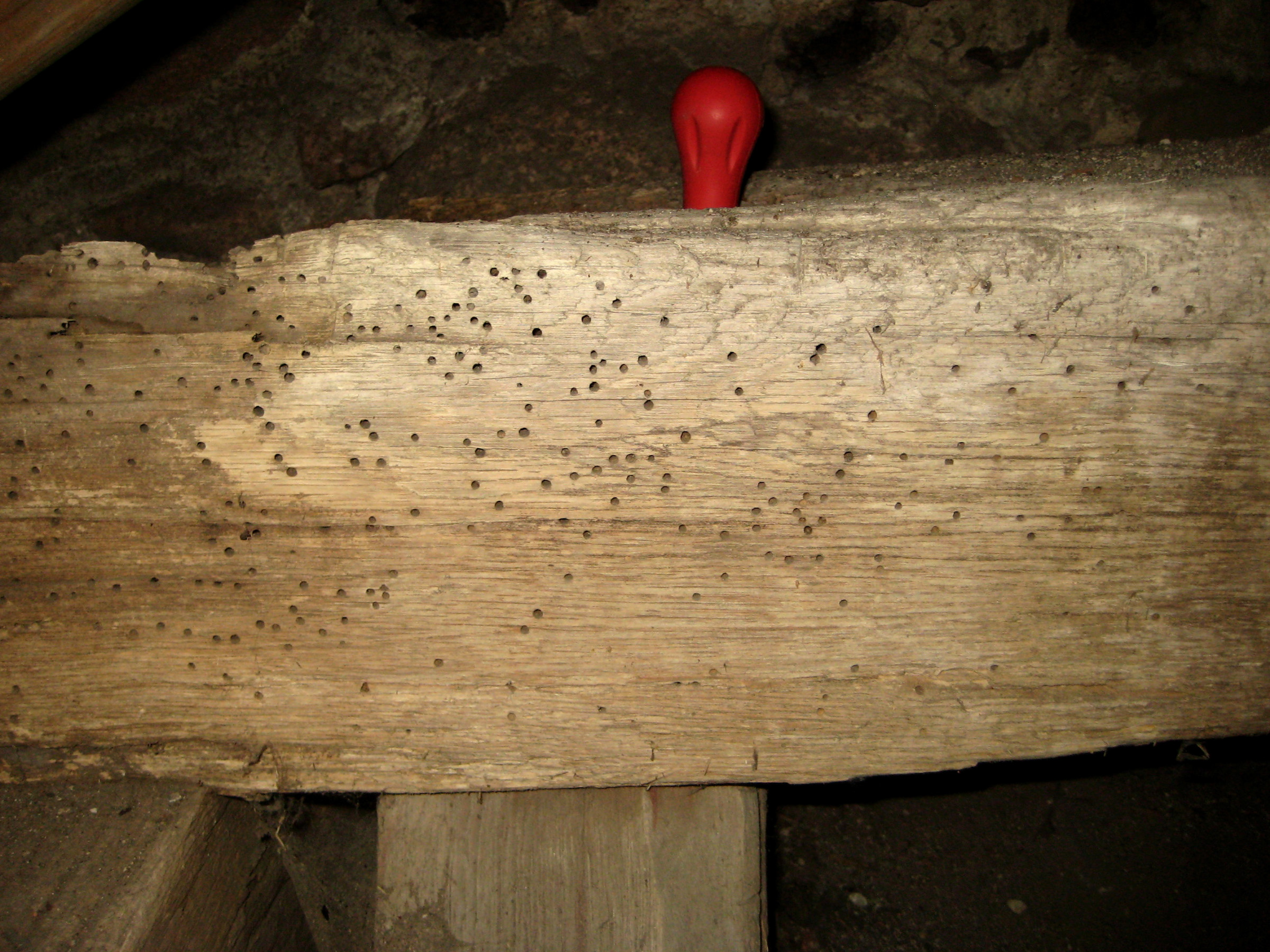 Balken aus Eichenholz in einer Kirchturmkonstruktion. Das Holz zeigt das typische Schadbild eines Befalls durch den Gescheckten Nagekäfer (Xestobium rufovillosum), in Form kreisrunder Schlupflöcher von ca. 4 mm Durchmesser. Der Balken ist durch holzzerstörende Pilze stark vorgeschädigt.